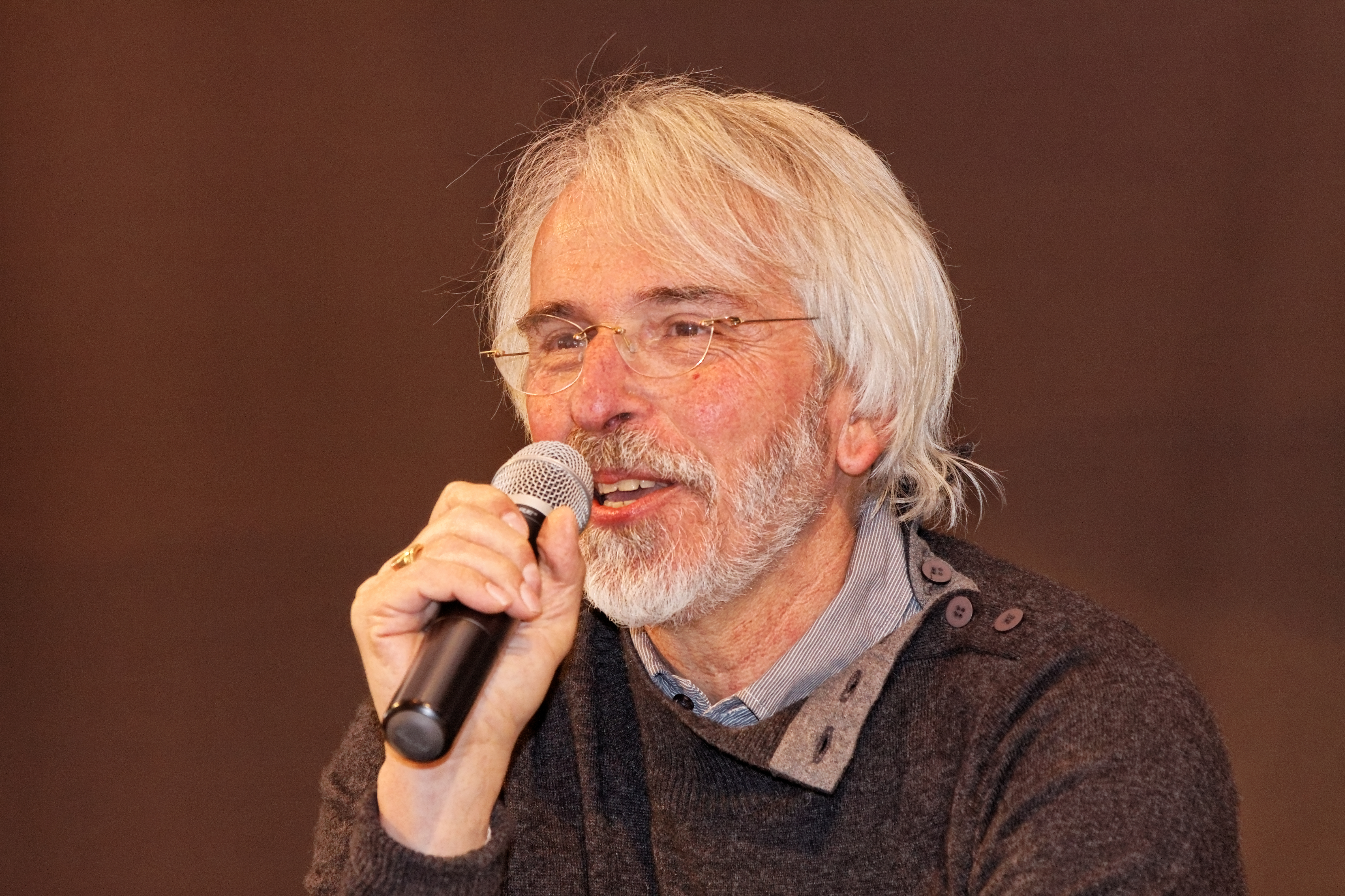 Philippe Delerm en conférence.